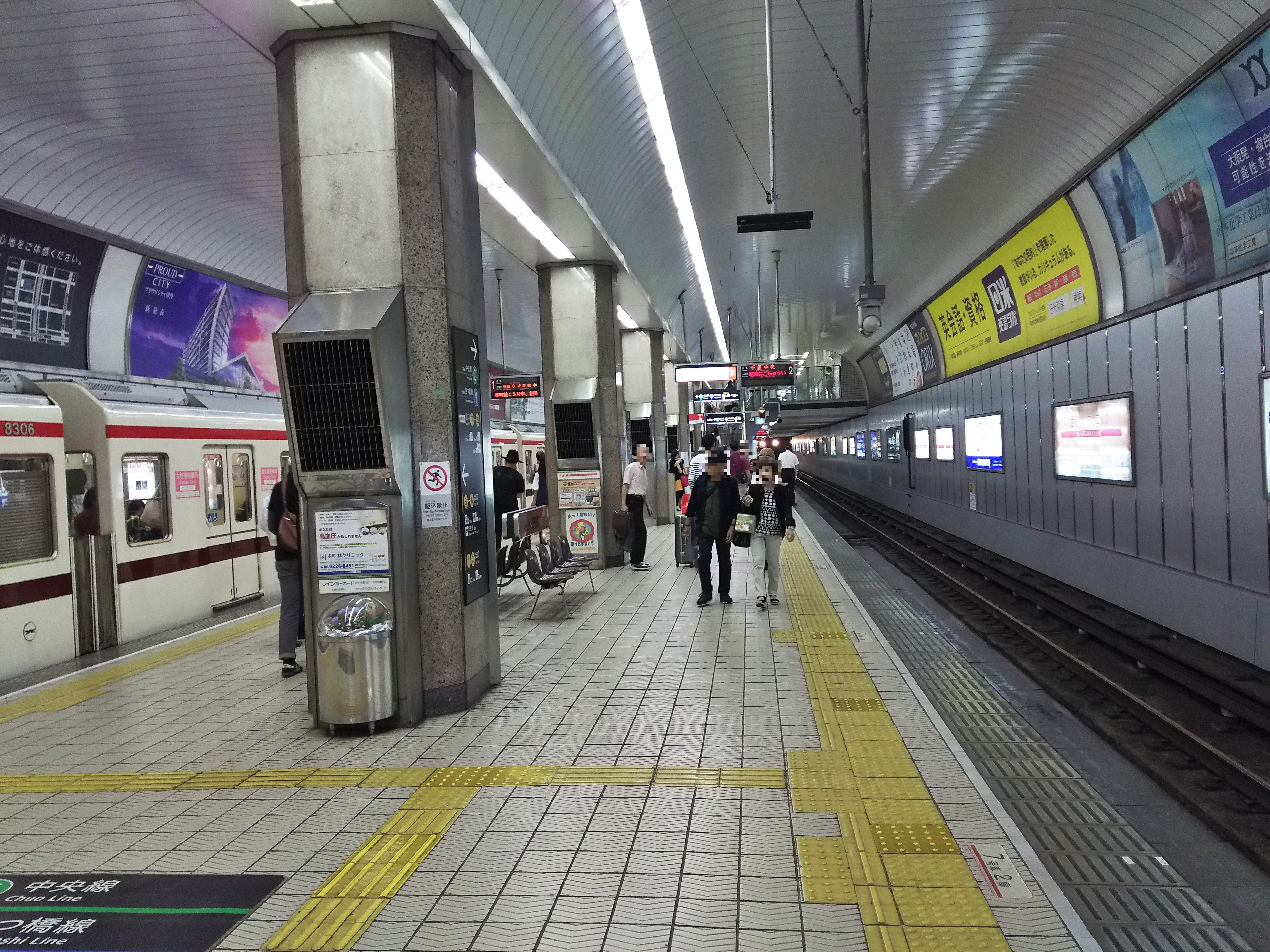 大阪市営地下鉄御堂筋線本町駅プラットホーム（大阪市中央区）